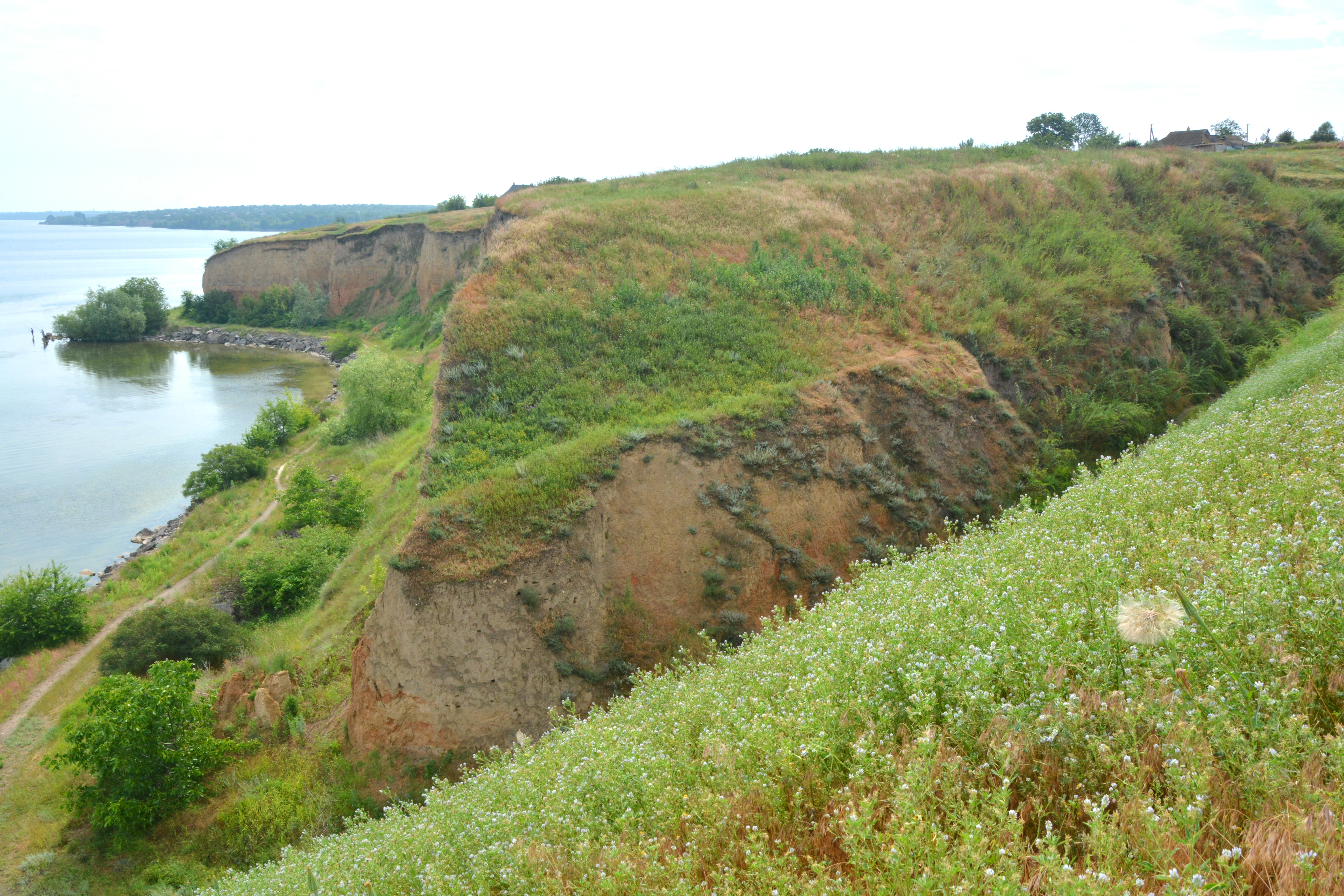 Городище Любимівське, село Любимівка